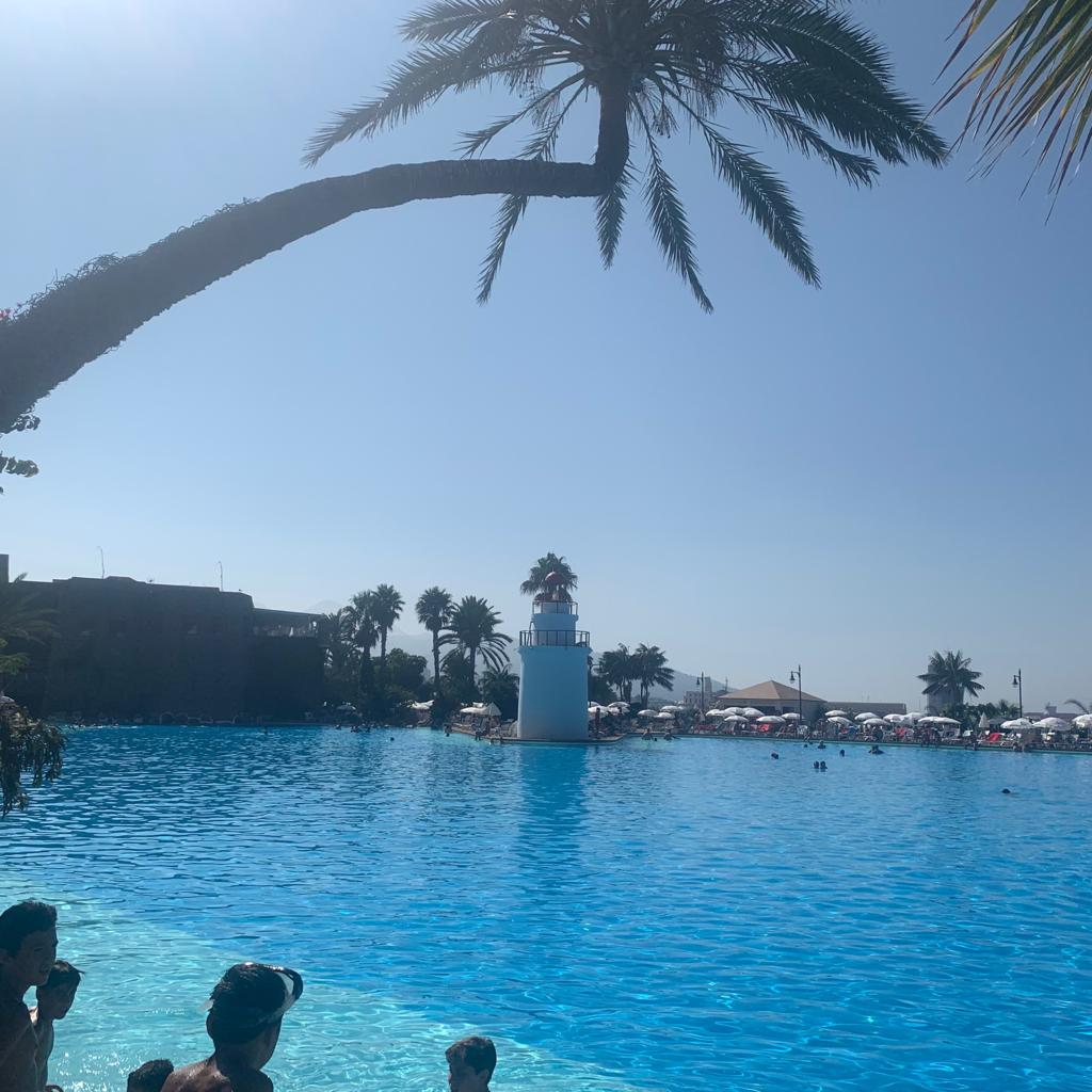 Vista parcial del segundo lago con faro al fondo